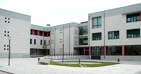 Foto de la Facultad de Ciencias Económicas y Empresariales de la Universidad de Burgos